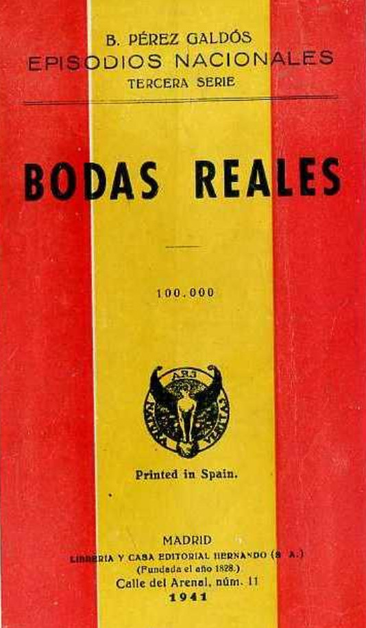 Portada de "Bodas reales" de Galdós, edición de 1941